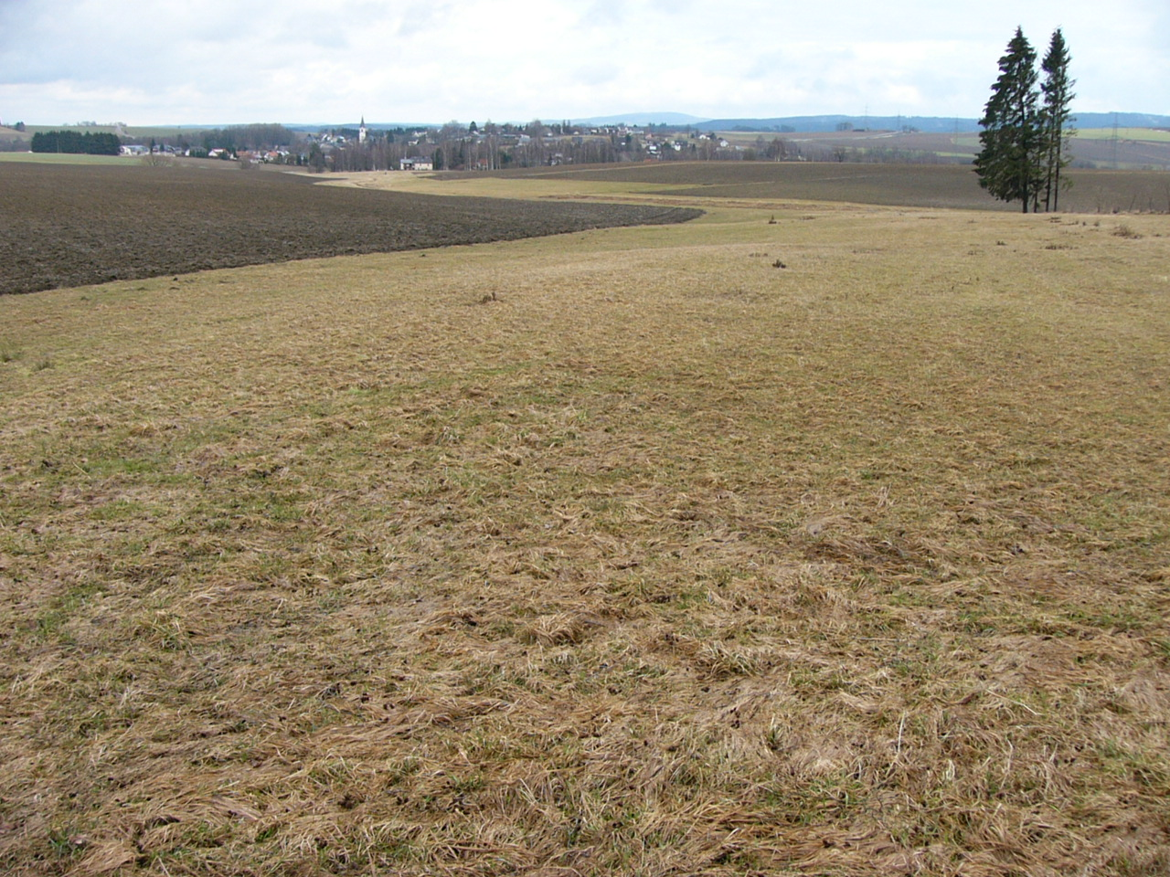 Flurbereinigter Streckenabschnitt vor Weißdorf